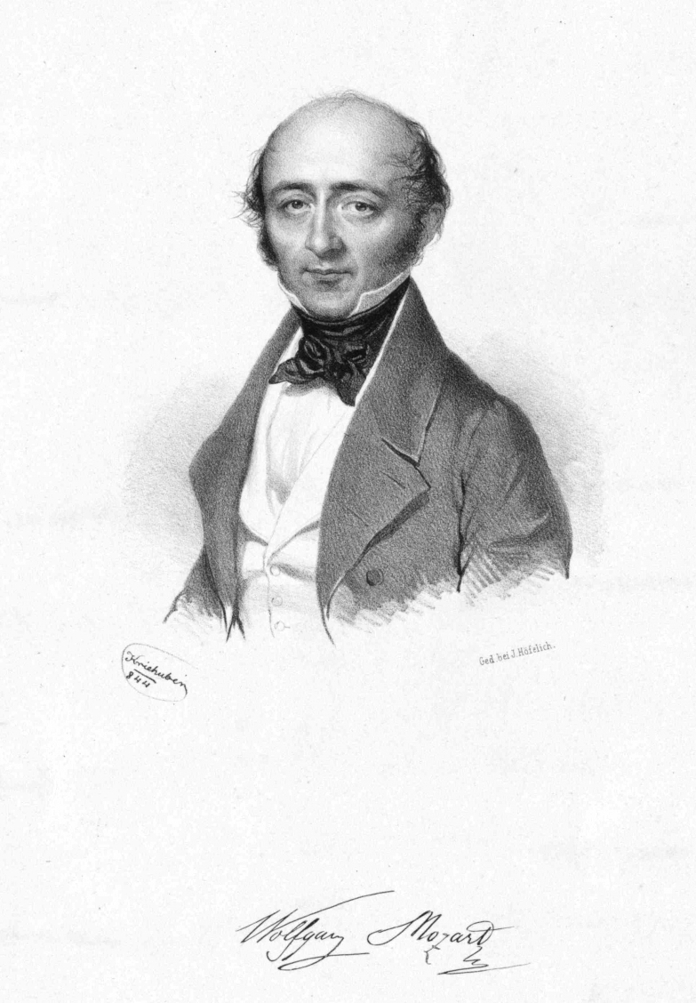 Mozart, Wolfgang Amadeus (1791-1844) Lithograph